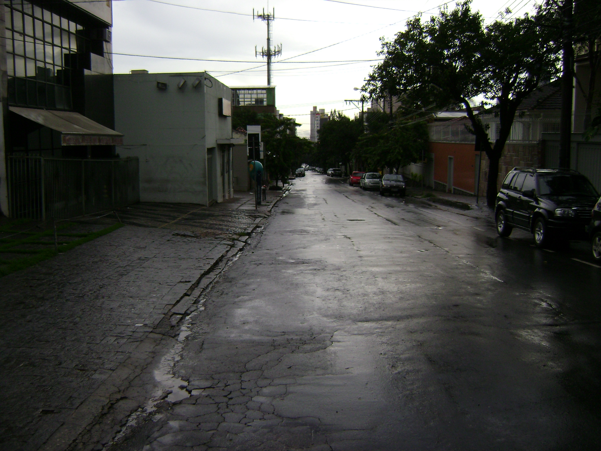 Rua Grão Mogol no bairro Carmo